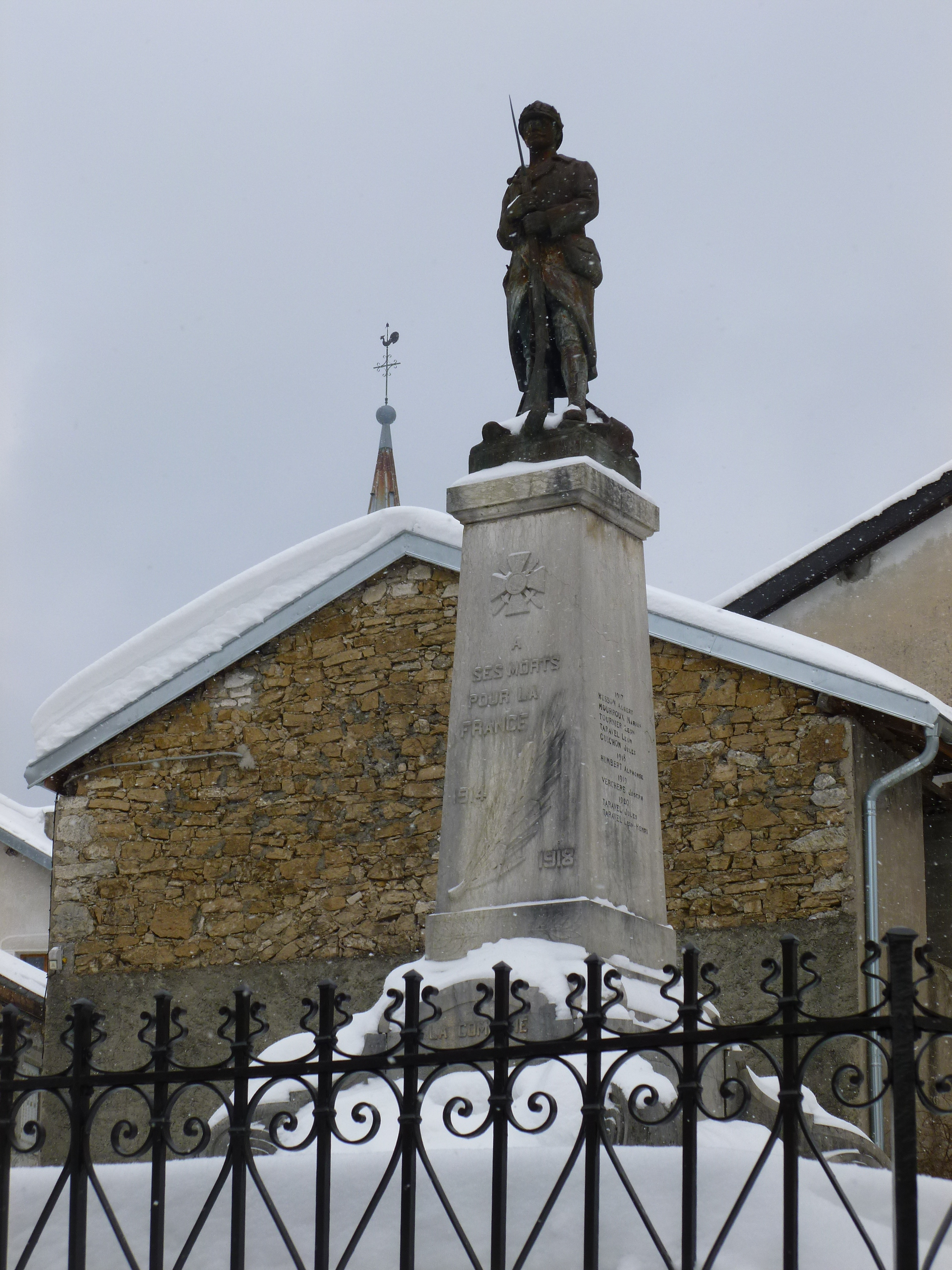 Monument aux morts de Charix, dans l'Ain